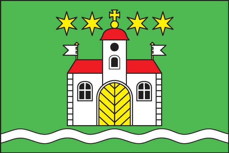 vlajka Věž